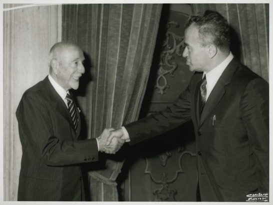 Il presidente della Camera dei Deputati Pietro Ingrao riceve il senatore Medici, presidente della Montedison